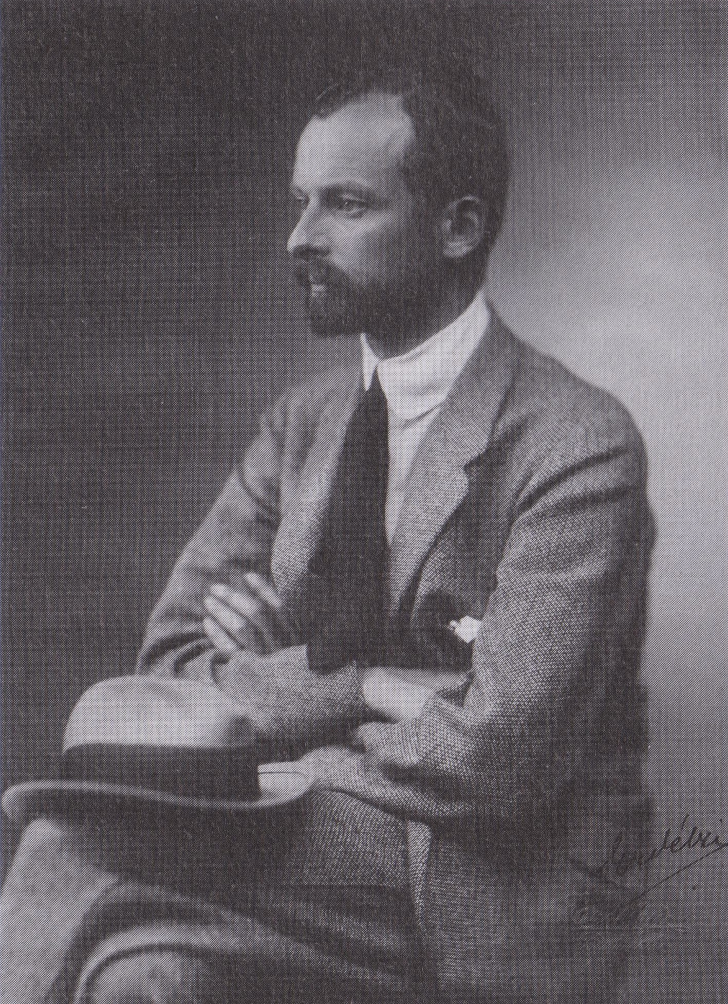 Móric Esterházy - premier Węgier w 1917 r.